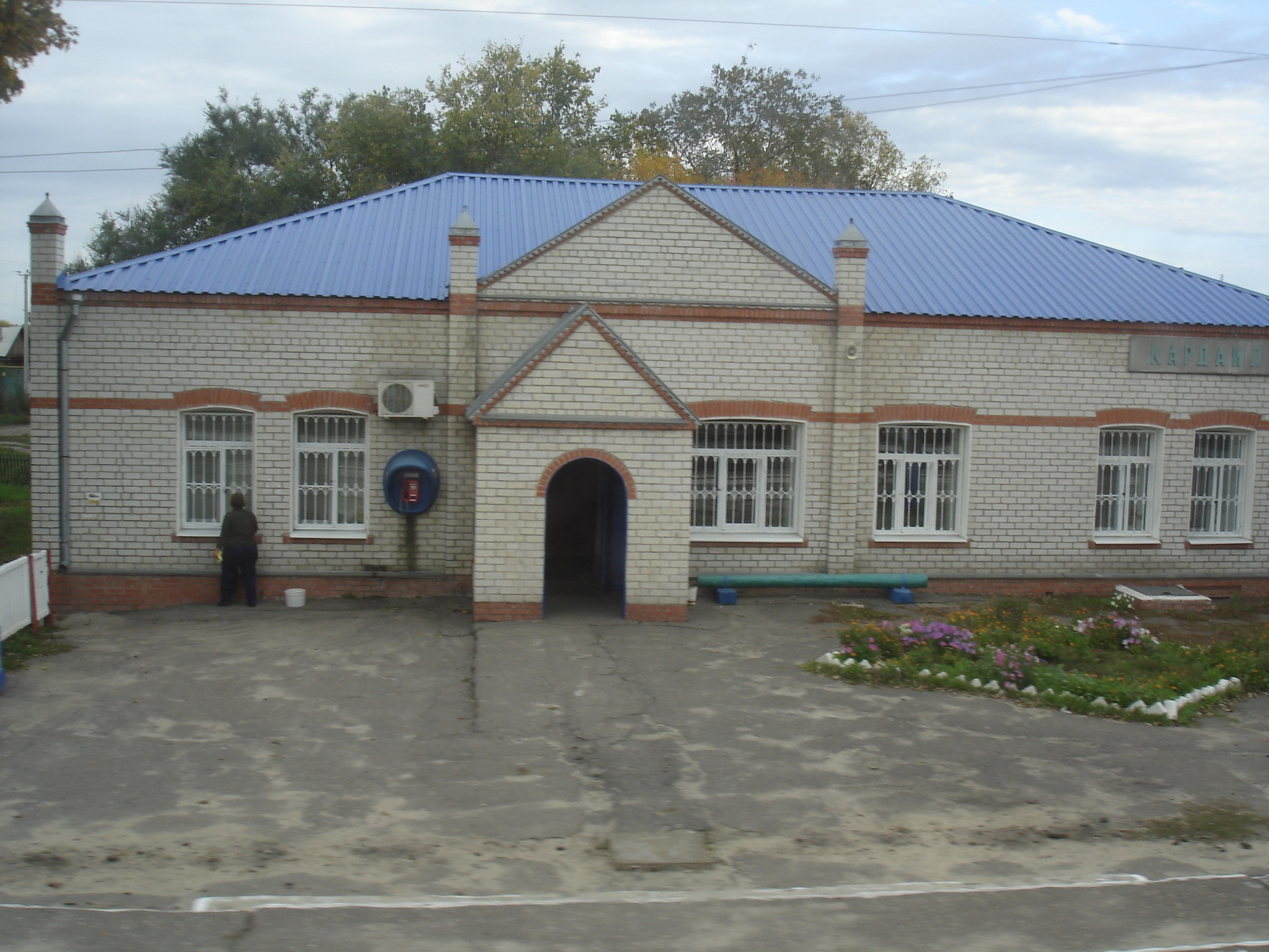 Здание железнодорожной станции Кардаил в селе Пески